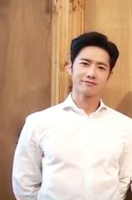 씬플레이빌 3월호는 서울 공연을 시작하는 뮤지컬 '그날들'의 배우 오종혁, 온주완, 윤지성이 장식했습니다. 씬플 독자들을 위해 미리 남겨준 인사!